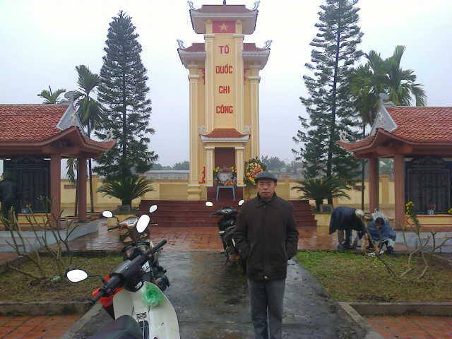 LỄ DÂNG HƯƠNG CÁC LIỆT SỸ